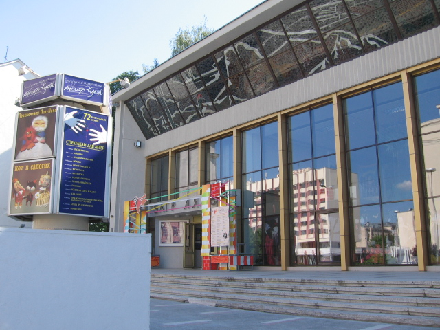 Минск, кукольный театр с программой